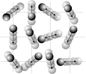 Molekylernas svägningar i en vätska och de vibrerar så kraftigt att flera kan byta plats med varandra. Trots allt så är de i genomsnitt bundna till gitterplatserna. Smältpunkten brukar uppskattas inträffa när elongationen relativt gitterplatserna överstiger 10% av mellanrummen. Skapad av Rogper / Created by Rogper